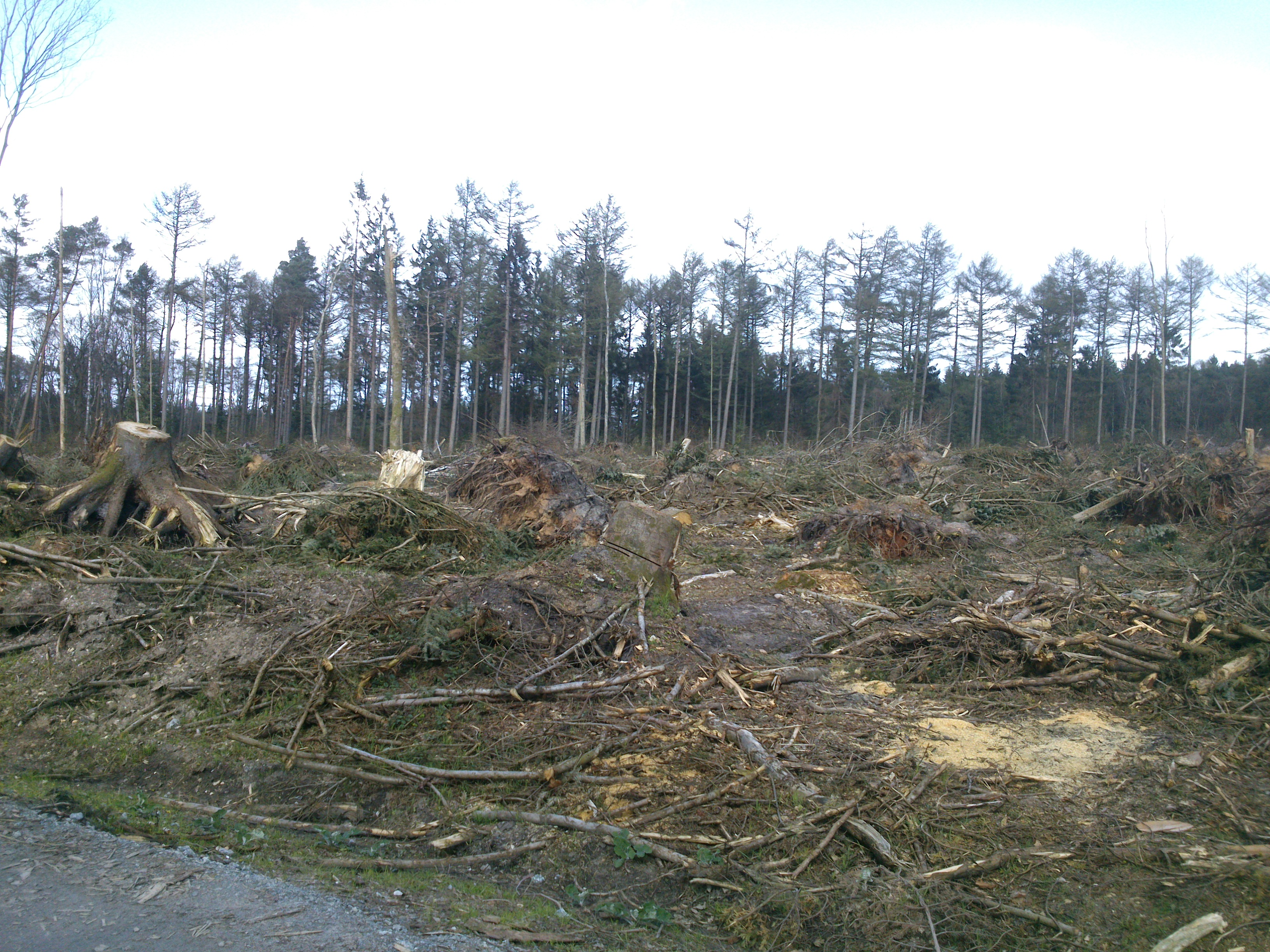 Auswirkungen nach dem Sturm Xaver 2013 im Handewitter Forst(1)